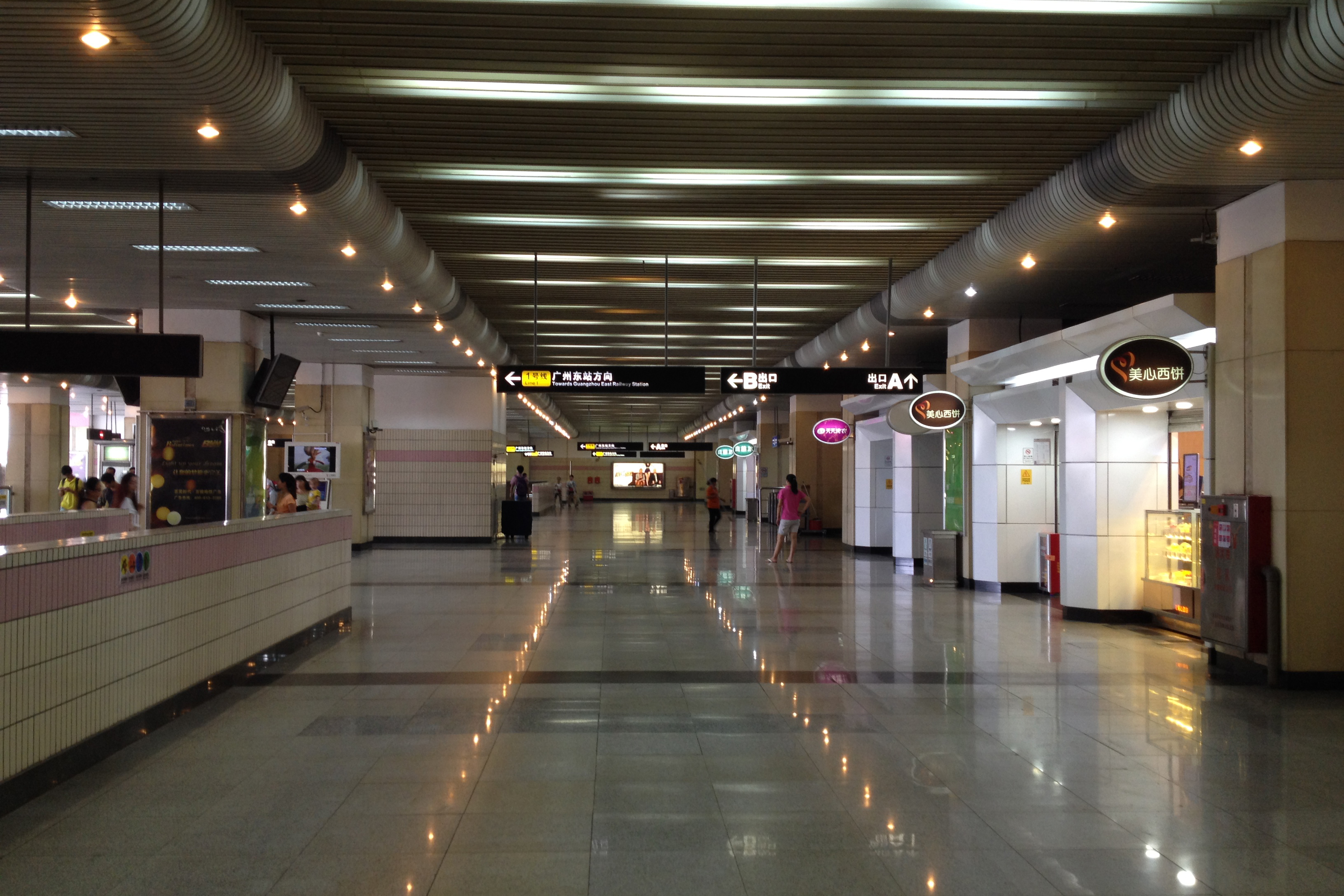 广州地铁西朗站1号线站厅（付费区）